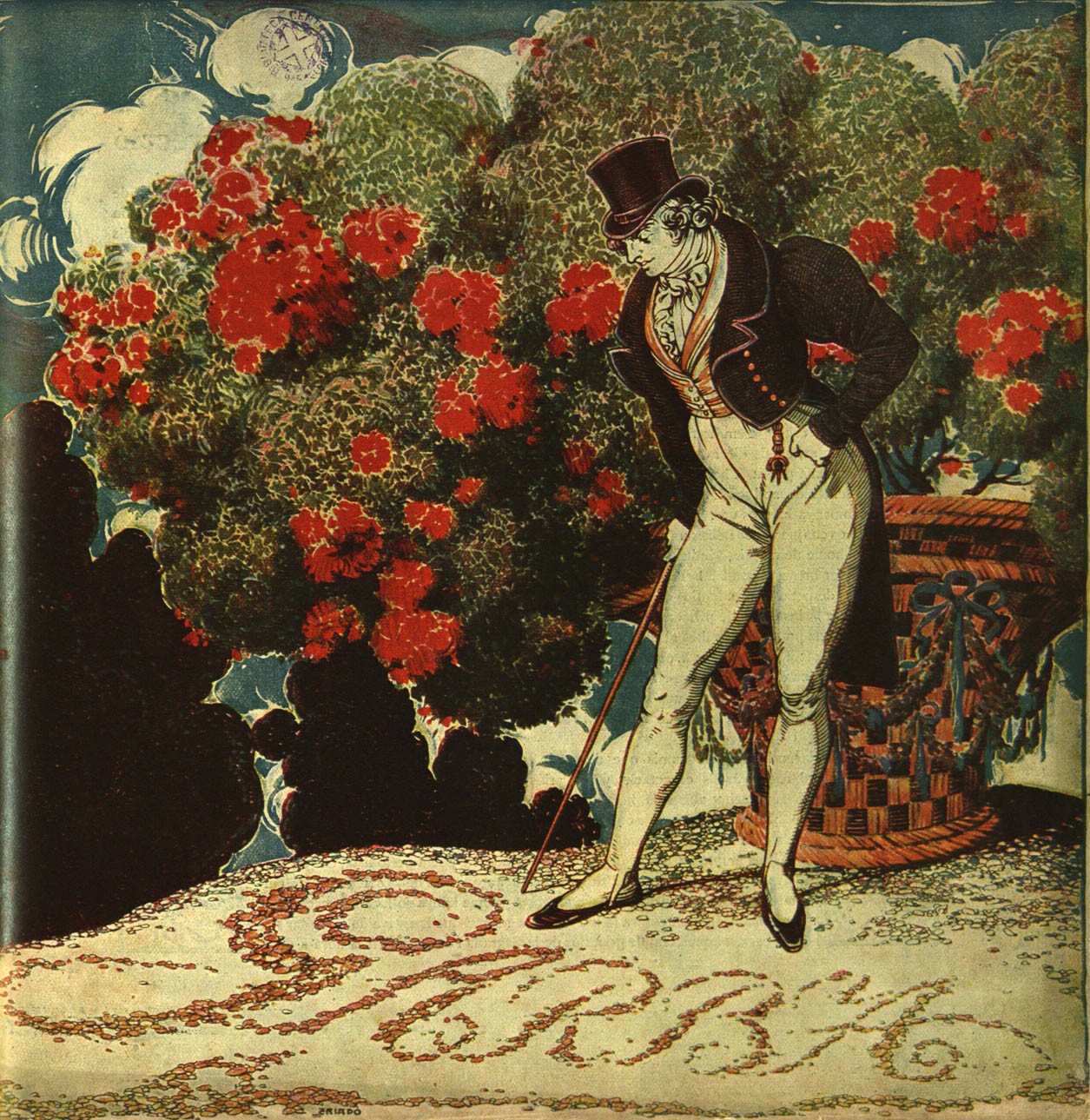 Garba (revista)